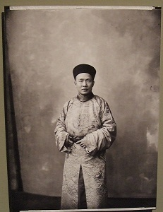 Photo de Chen Jitong, diplomate chinois, par Nadar, 1891